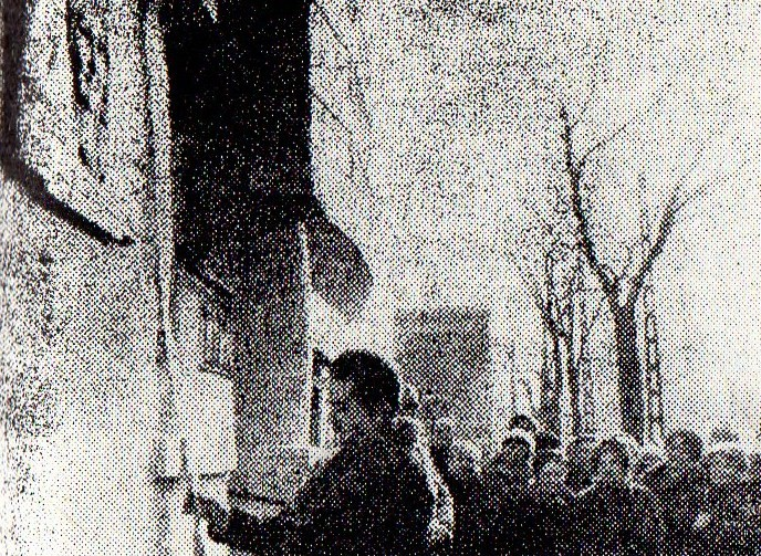 Andrzej Wituski otwiera Muzeum-Pracownie Kazimiery Iłłakowiczówny w Poznaniu na ul. Gajowej. 16 luty 1984r.